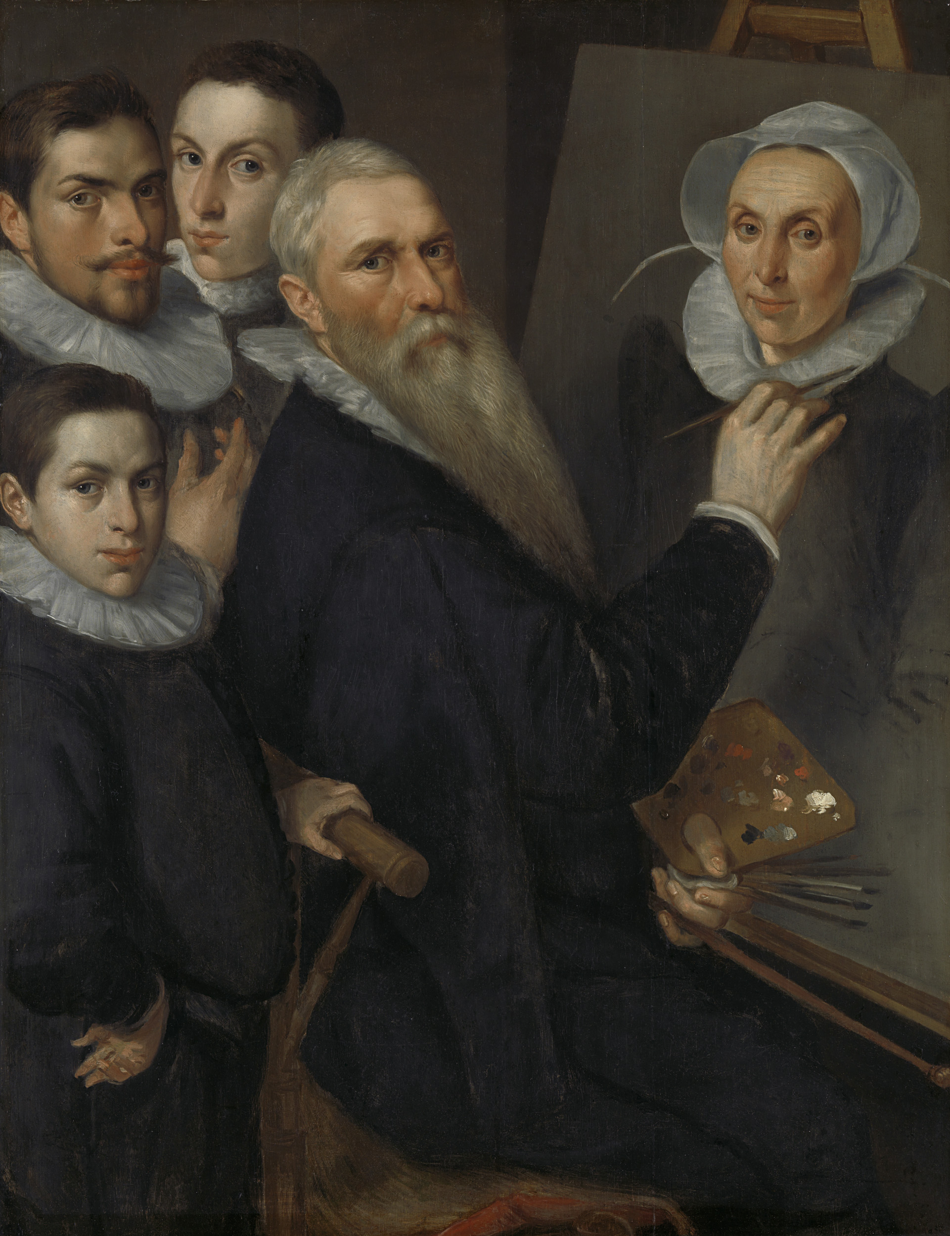 Zelfportret van de schilder Jacob Willemsz. Delff (I) met zijn gezin. De kunstenaar schildert een portret van zijn vrouw Maria Joachimsdr Nagel. Achter hem staan zijn drie zonen, (de latere schilders) Cornelis Delff, Rochus Delff en (de graveur) Willem Delff.